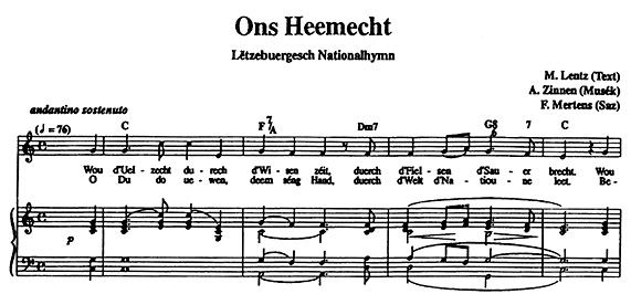 Ons Heemecht ass d'Nationalhymn vu Lëtzebuerg. D'Melodie vun der Heemecht ass vum Jean-Antoine Zinnen (1827-1898) an d'Wierder vum Michel Lentz (1820-1893).